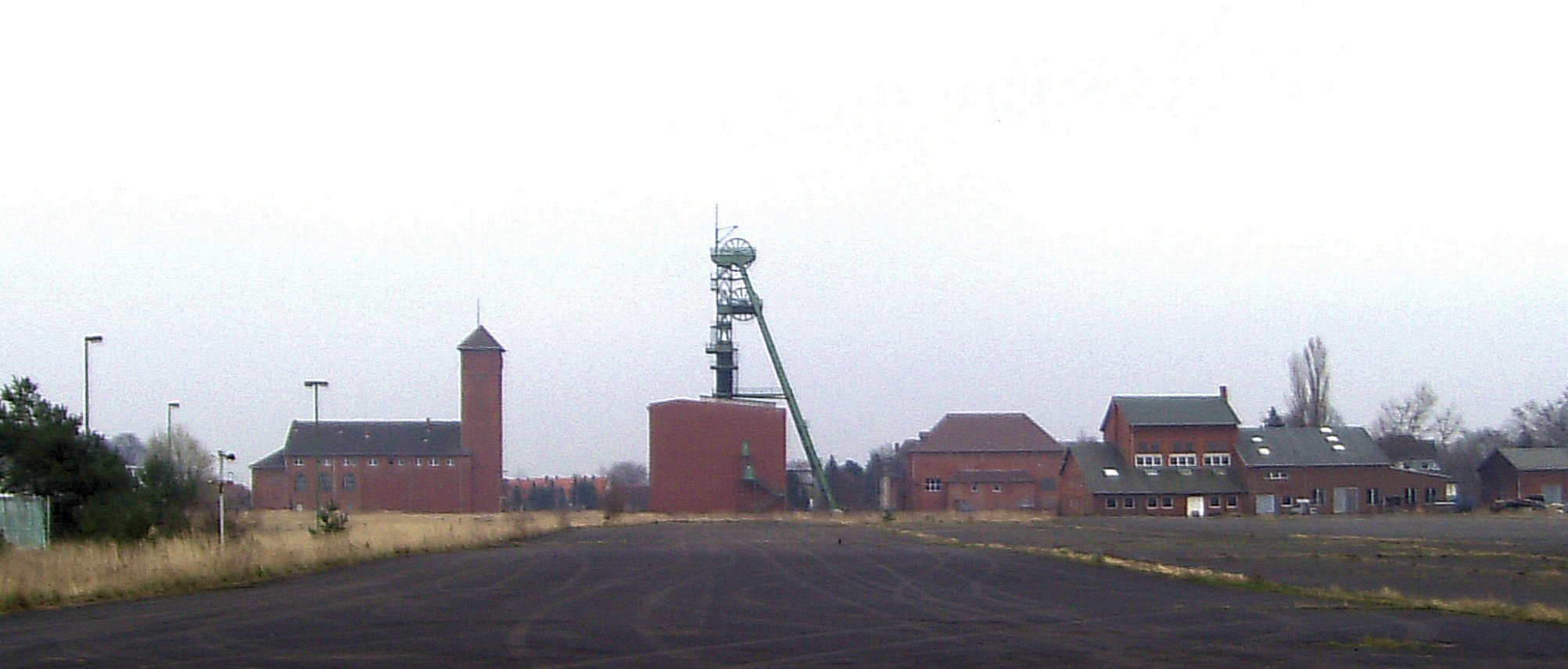 Gelände des Schachtes Riedel in Hänigsen - 1996 geschlossenes, weltweit tiefstes Kalisalz-Bergwerk (1525 m)